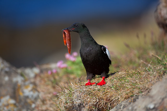 Gryllteiste mit Atlantischem Butterfisch eigenes Foto